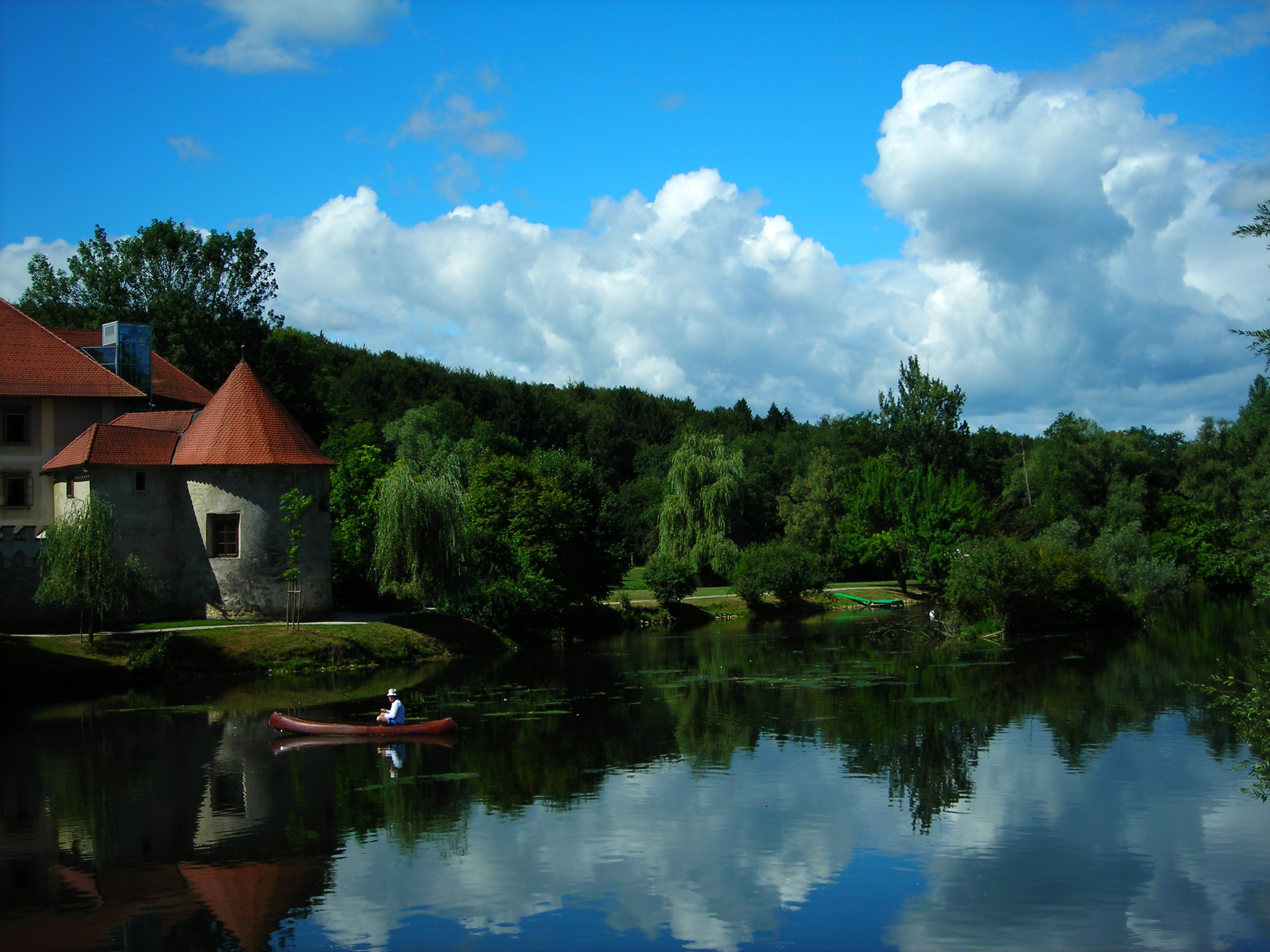 Otočec, Slovenia